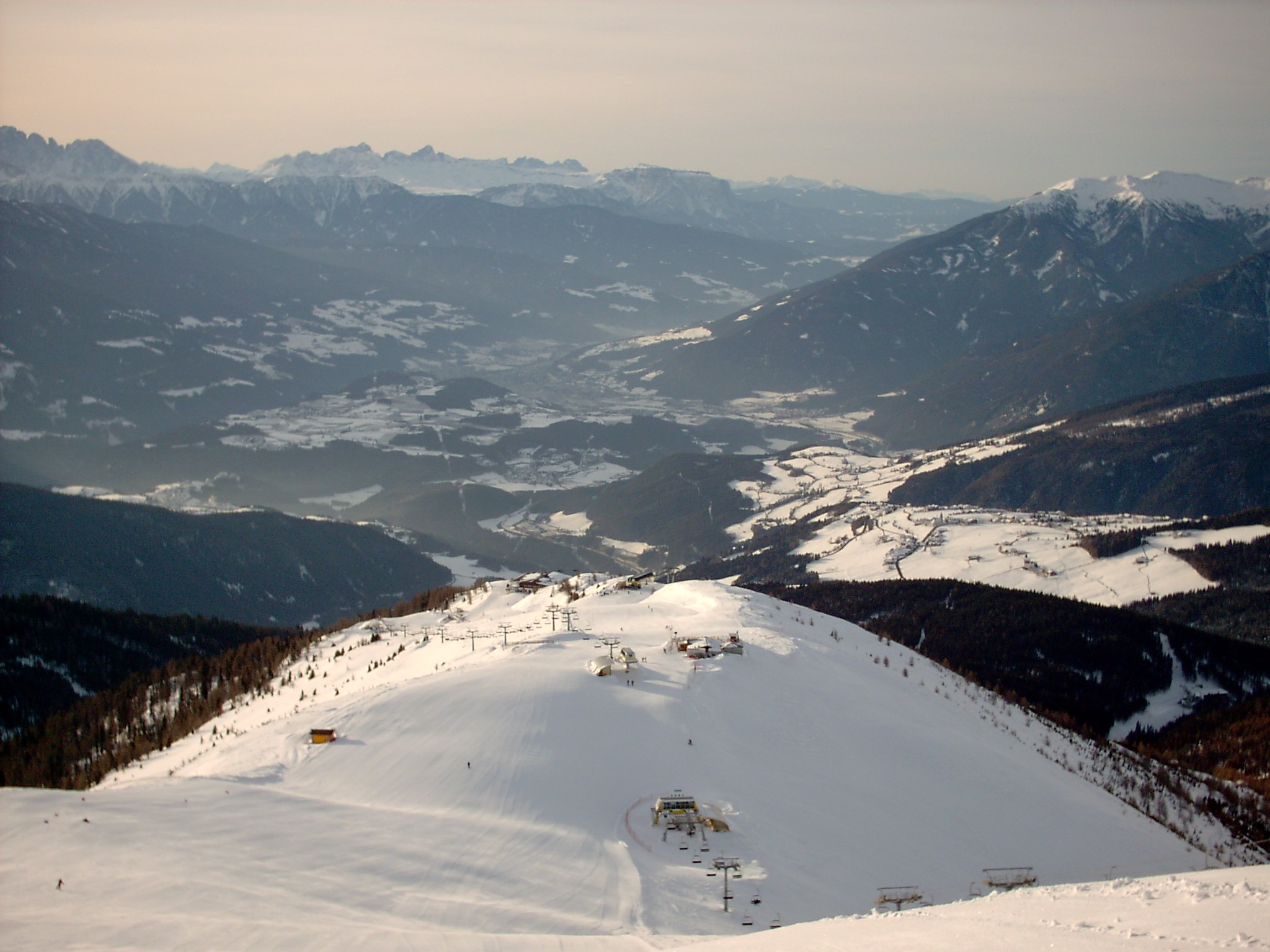 Blick vom Gitschberg. Rechts das Eisacktal mit den Zillertaler und Sarntaler Alpen. Geradeaus die Stadt Brixen und die Dolomiten. Links geht es ins Pustertal.